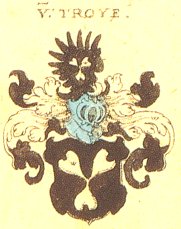 Wappen der von Trohe (von Troye), Ausschnitt aus: Johann Siebmacher: New Wappenbuch, eingescannt aus: Horst Appuhn (Hrsg.), Johann Siebmachers Wappenbuch. Die bibliophilen Taschenbücher 538, 2. verb. Aufl , Dortmund 1989 Hessische, Blatt 135